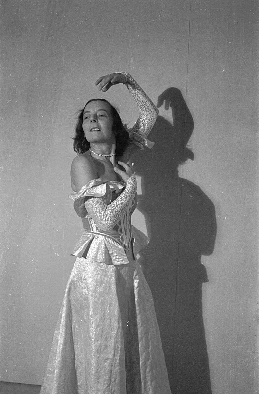 Original image description from the Deutsche Fotothek Aufnahmen von M. Friedrichs, M. Fischer, Hermann Matern, Arno Schellenberg und Frau, Frau Gret Palucca, Erich Ponto, Prof. Joseph Keilberth, Otto Falvay